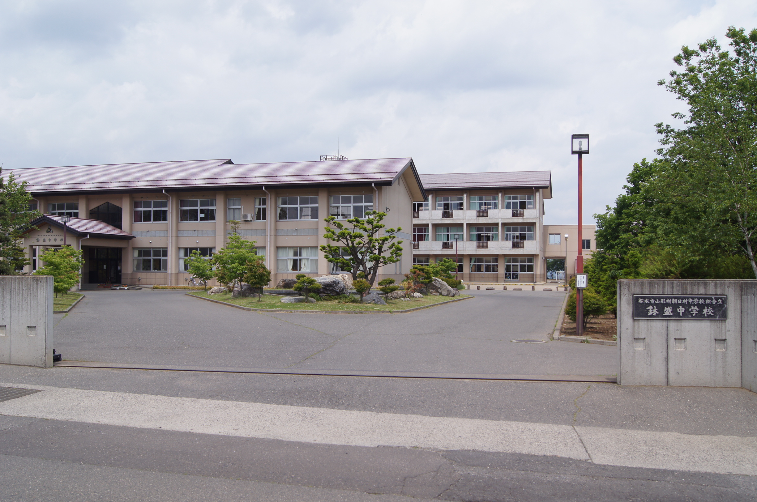 長野県の山形村と朝日村の教育事務組合による組合立中学校である鉢盛中学校の前景